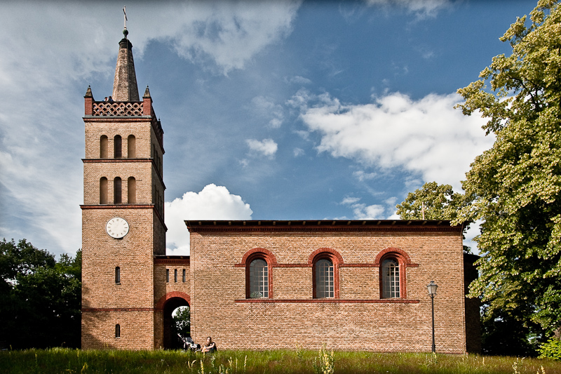 Petzow Kirche Church Eglise